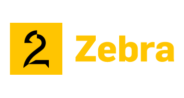 Logo for TV 2 Zebra